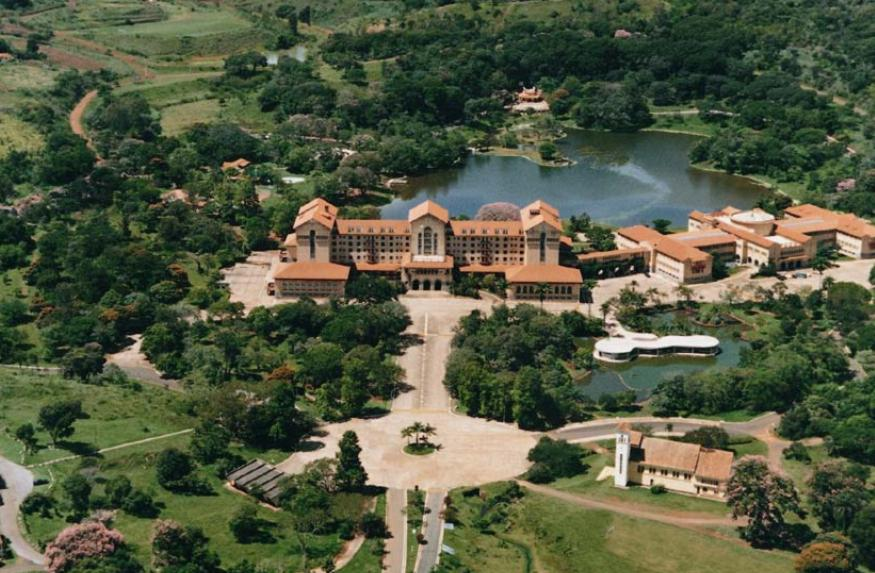 Grande Hotel de Araxá, Minas Gerais, Brasil, inaugurado em 1944, por Benedito Valadares, então governador de Minas Gerais, e pelo presidente Getúlio Vargas, o complexo do Grande Hotel abriu uma nova era de esplendor para Araxá e todo o interior mineiro, sendo palco de grandes acontecimentos sociais, políticos e culturais. Autor: Samuel Peixoto.